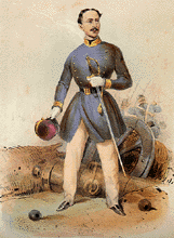 re Francesco II, circa 1860.